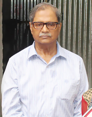 মেজর অবঃ রফিকুল ইসলাম বীর উত্তম, বাংলাদেশী রাজনীতিবিদ। চাঁদপুর-৫ আসনের সংসদস দস্য।